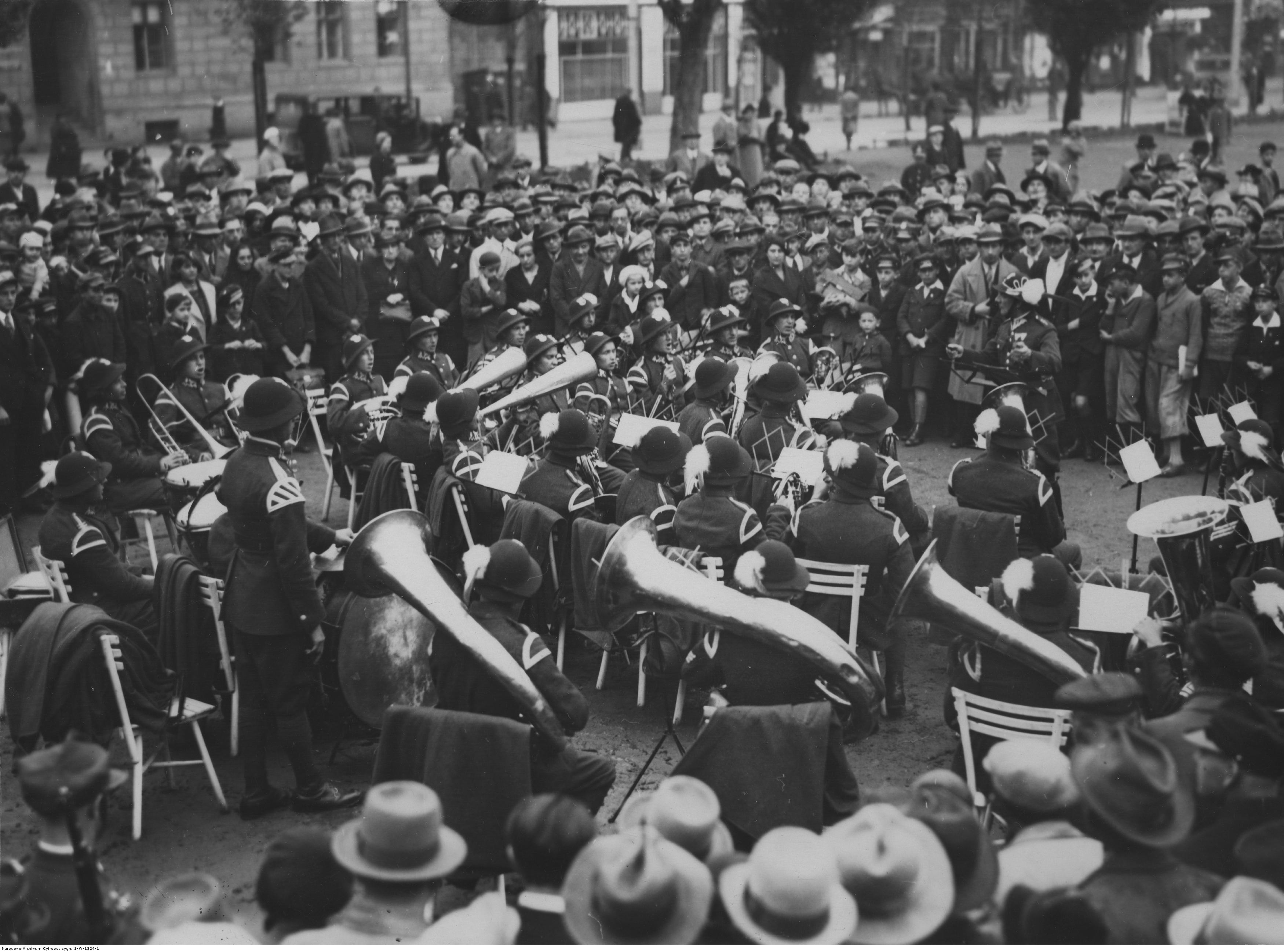 Wycieczka 5 Pułku Strzelców Podhalańskich do Poznania - koncert orkiestry pułkowej na pl. Wolności. Koncern Ilustrowany Kurier Codzienny - Archiwum Ilustracji. Sygnatura: 1-W-1324-1